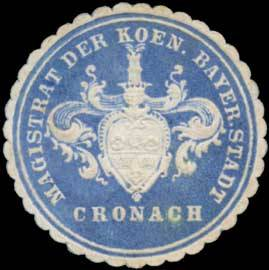 Sealing stamp Title: Magistrat der Koen. Bayer. Stadt Cronach Description: blau, weiß, geprägt Place: Kronach size: 3 cm